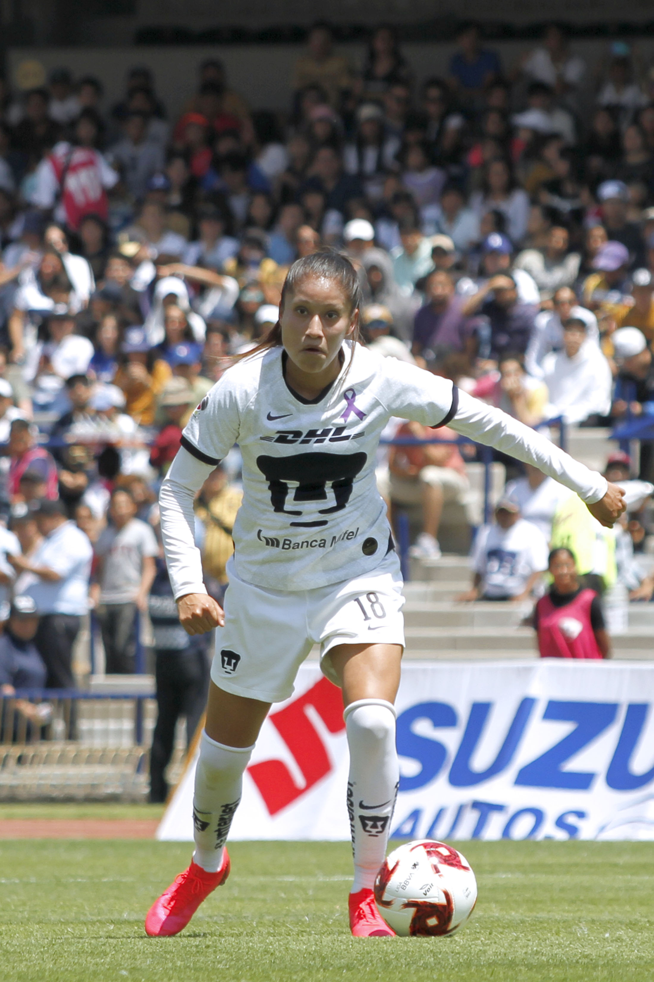 Sábado 14 de marzo de 2020 Como parte de las actividades de Tiempo de Mujeres. Festival por la Igualdad, se realizó, en el Estadio Olímpico de Ciudad Universitaria, el primer partido de la Liga Femenil MX entre los equipos Pumas de la UNAM y Cruz Azul. Fotografía: Maritza Ríos / Secretaría de Cultura de la Ciudad de México